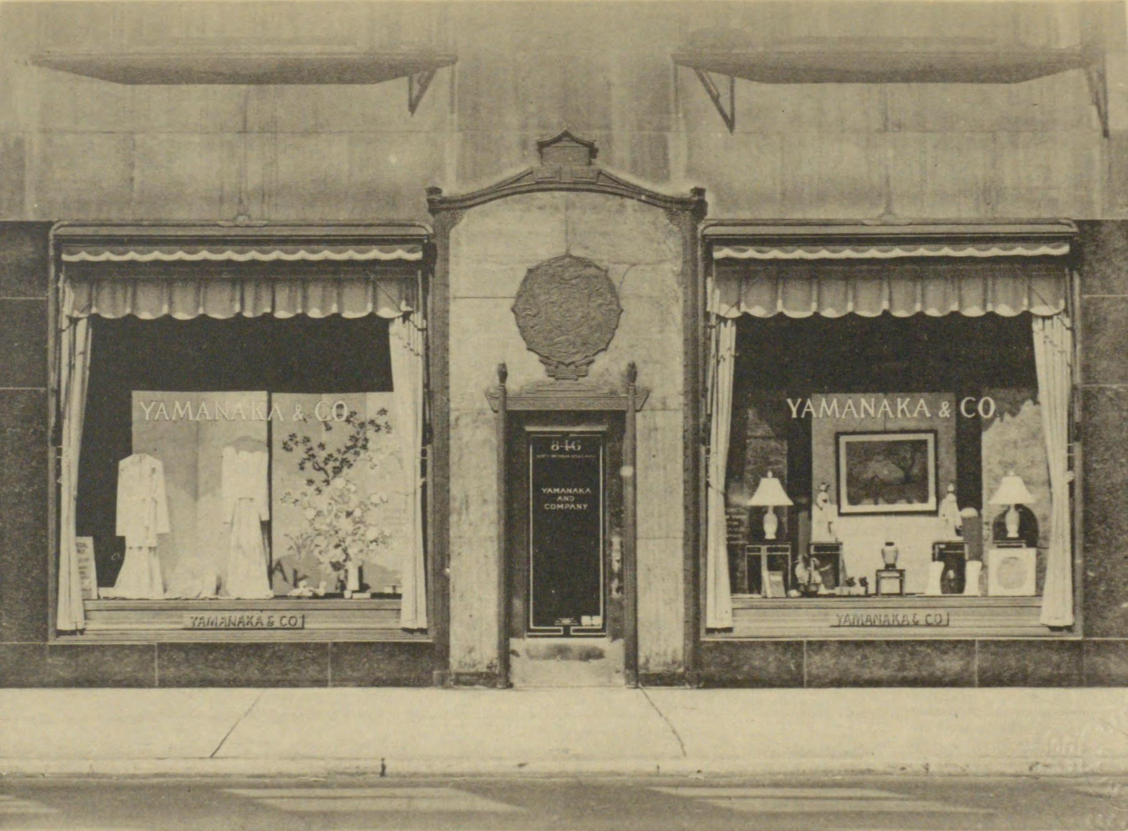 山中商会シカゴ支店